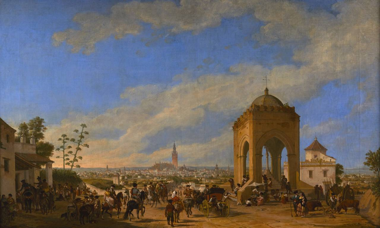 En esta obra se representa, con una interpretación amable de la realidad, una variopinta muchedumbre compuesta por los tipos populares más tópicos en un escenario emblemático. Bécquer muestra una gran capacidad escenográfica en la amplia perspectiva de la ciudad con la Giralda al fondo. Los espacios de luz y de sombra definen la composición y es esta vista urbana luminosa y brillante la que retiene nuestra retina.